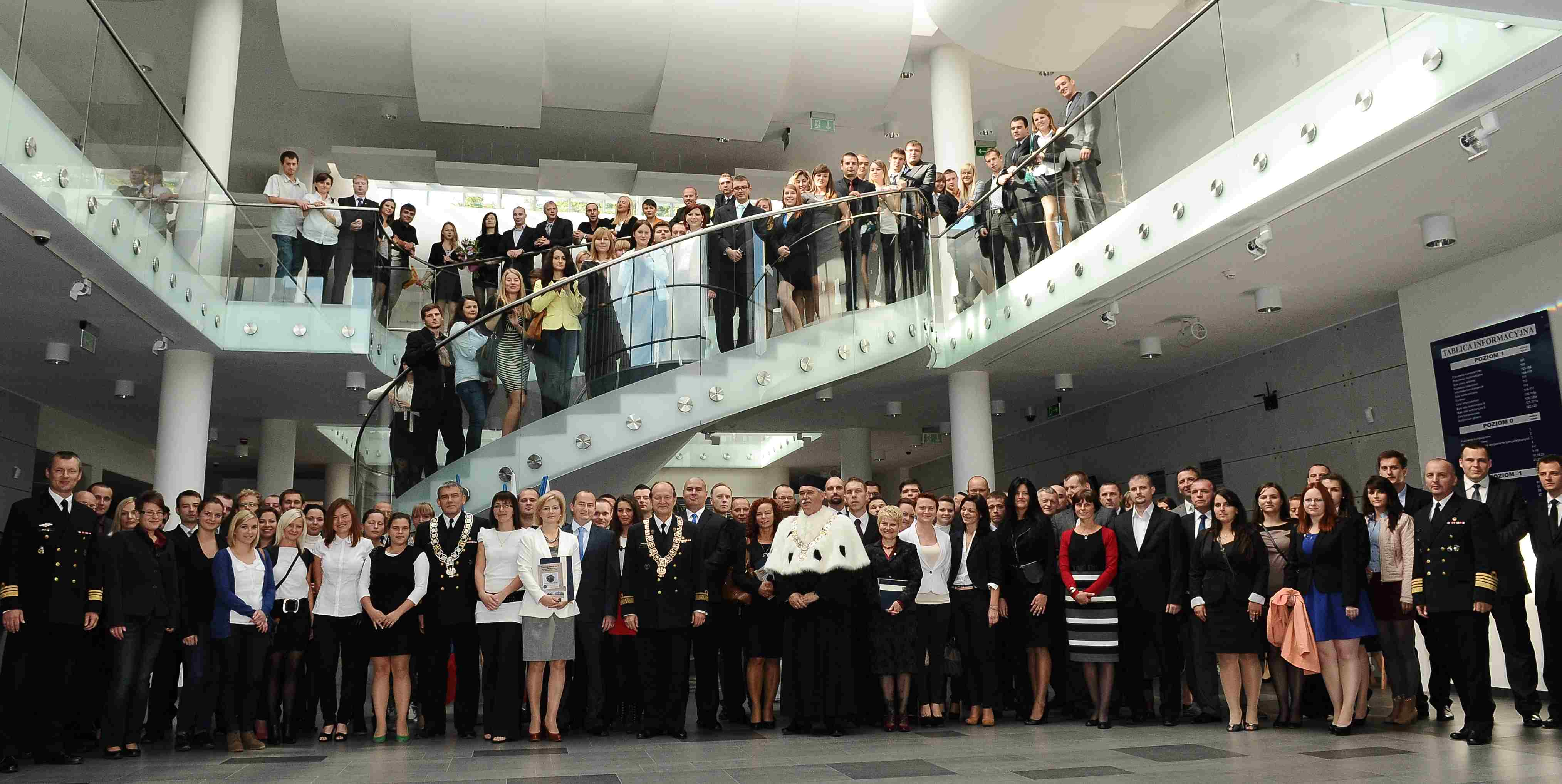 Społeczność Wydziału Dowodzenia i Operacji Morskich AMW podczas wręczenia dyplomów absolwentom w 2013 r.